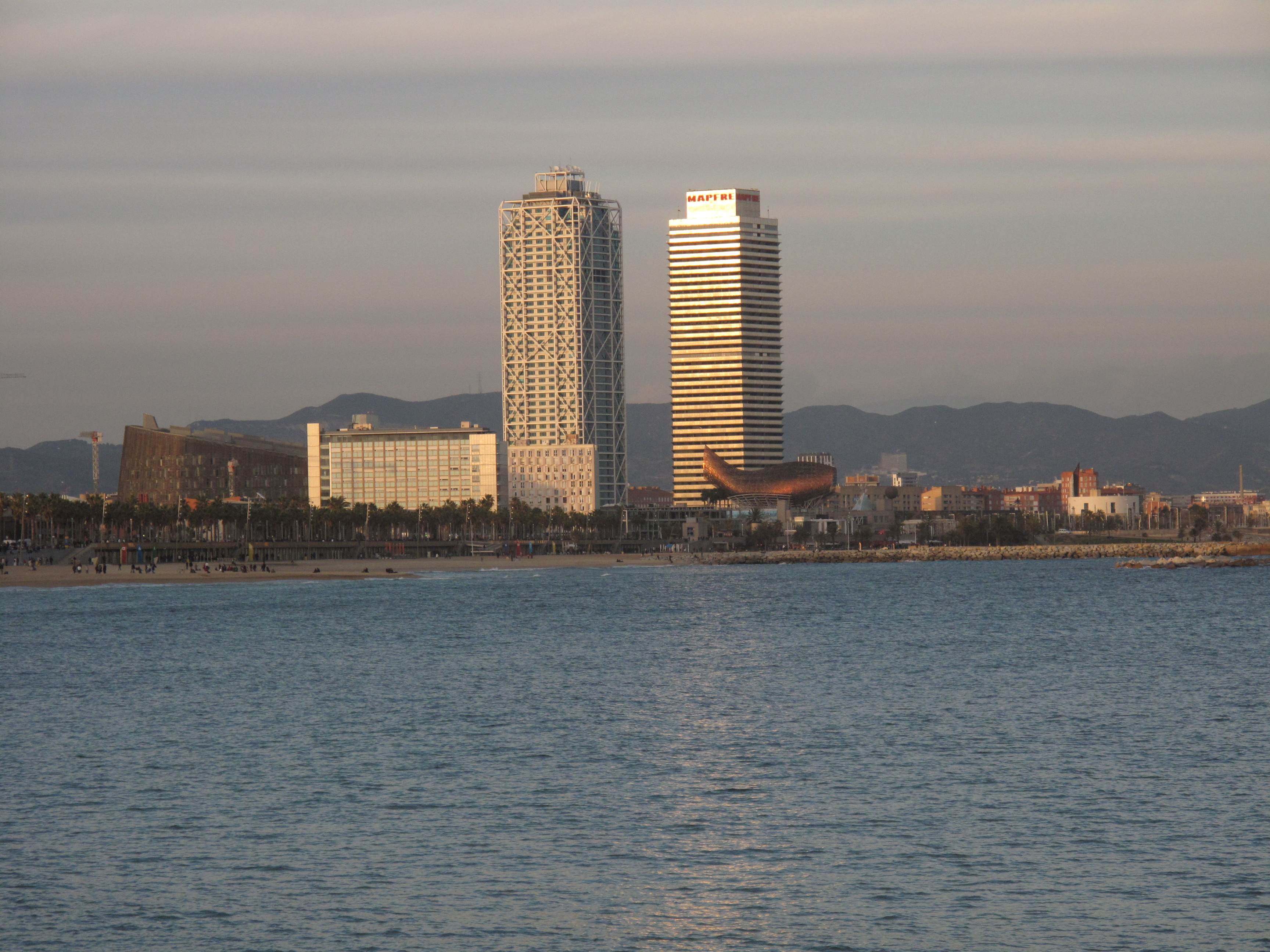 Peix (Frank Gehry). Pg. Marítim de la Barceloneta (Barcelona)